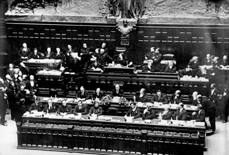 Parlamente aus aller Welt! Blick in das italienische Parlament in Rom während einer Rede des Diktators Mussolini. Information added by Wikimedia users.* Il governo italiano nel 1930 alla Camera. Seduto al centro del tavolo in basso, il dittatore fascista e capo del governo Benito Mussolini.